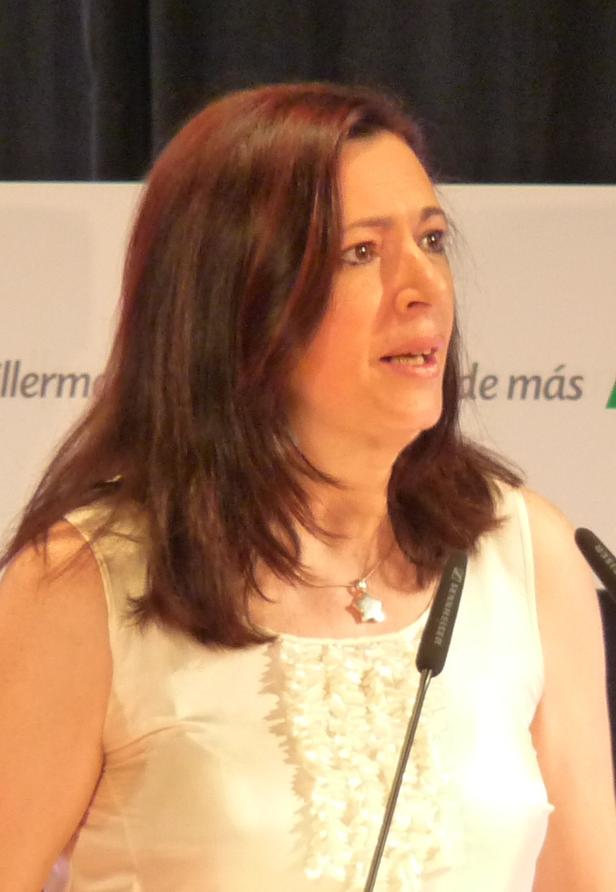 Intervención de Elia María Blanco